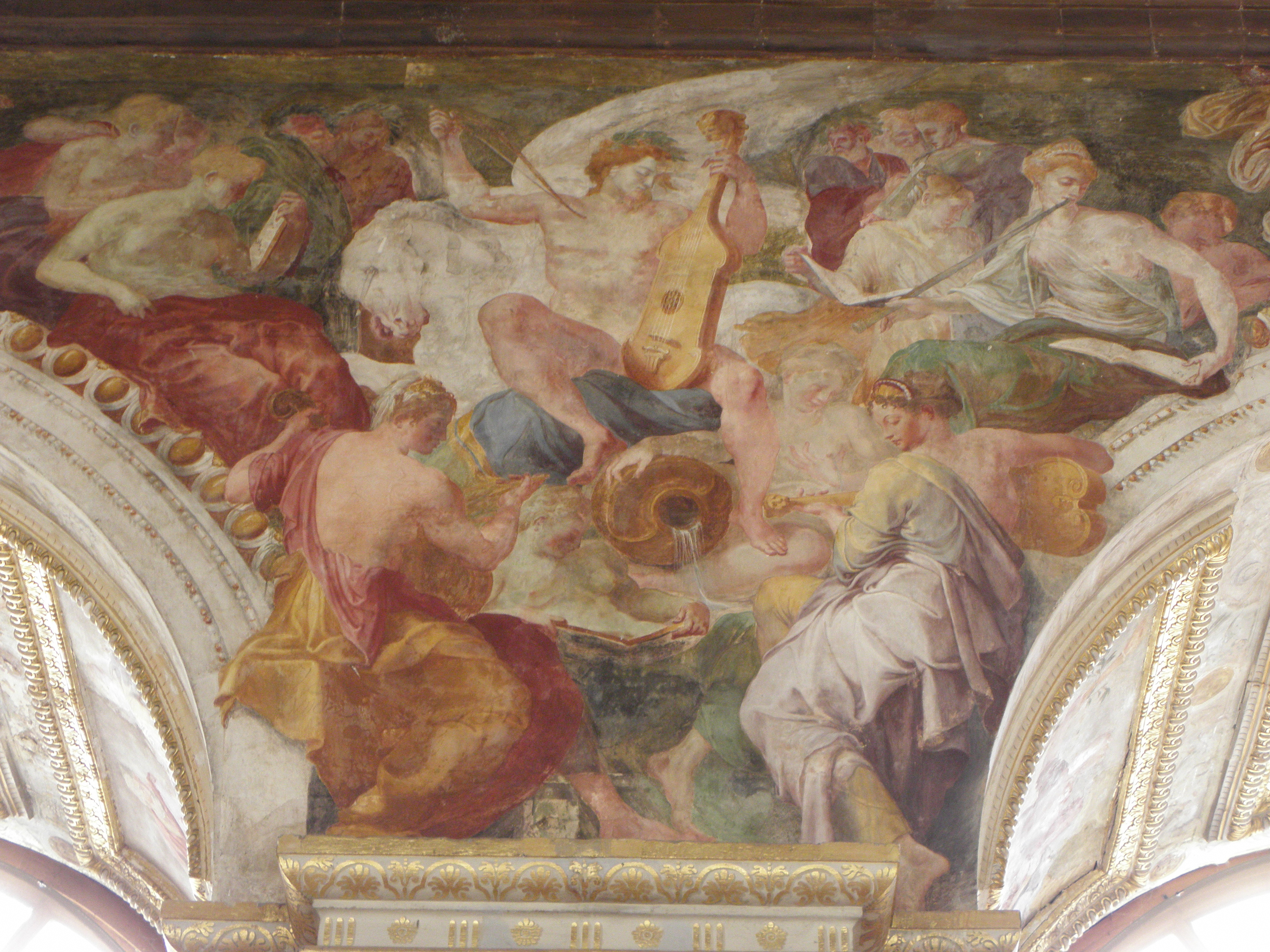 Apollon et les Muses sur le Parnasse. Fresque de la Salle de Bal du Château de Fontainebleau (77). .